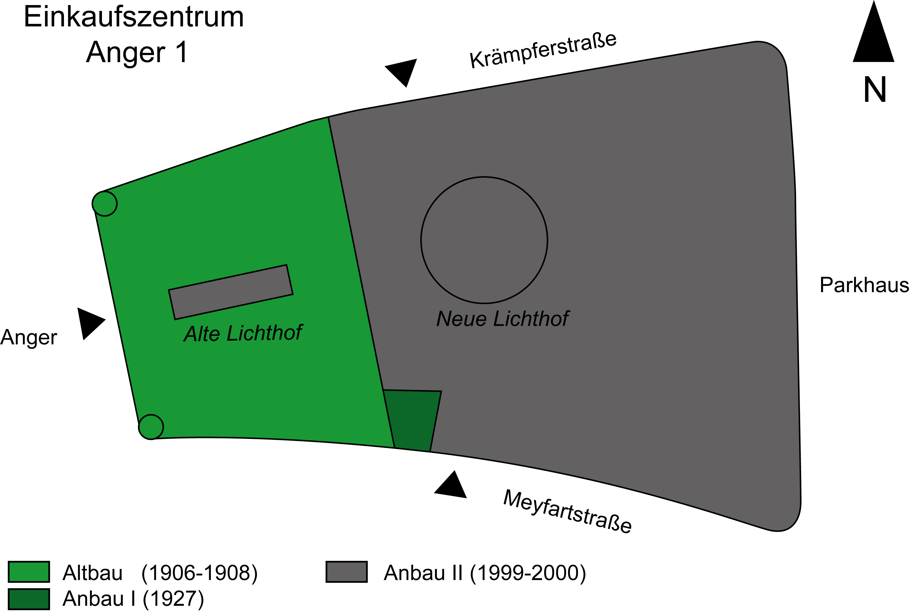 Grundriss des Einkaufszentrum Anger 1, am Anger in Erfurt